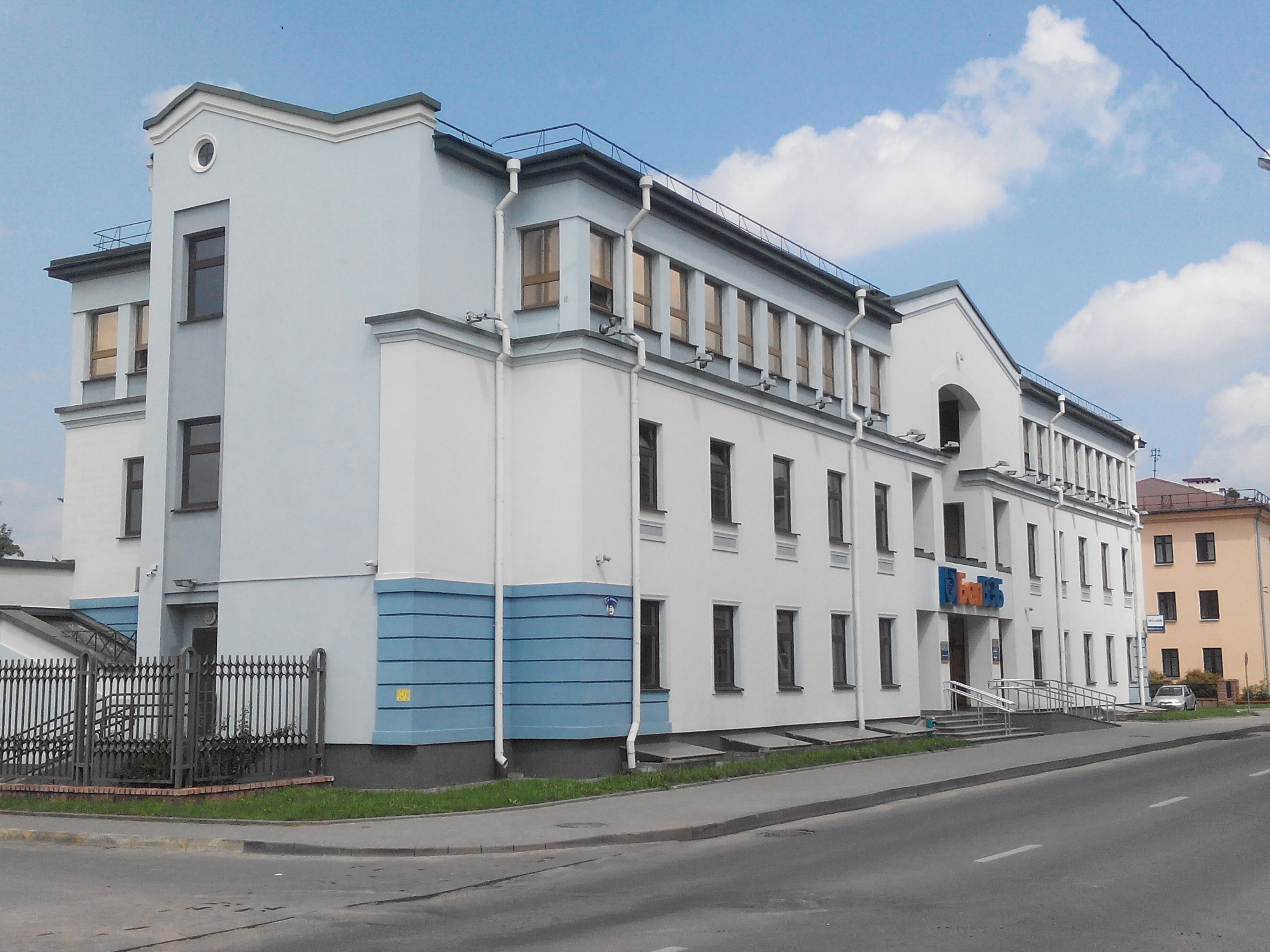 Будынак па вуліцы Вялікая Траецкая, 51, Гродна, Беларусь